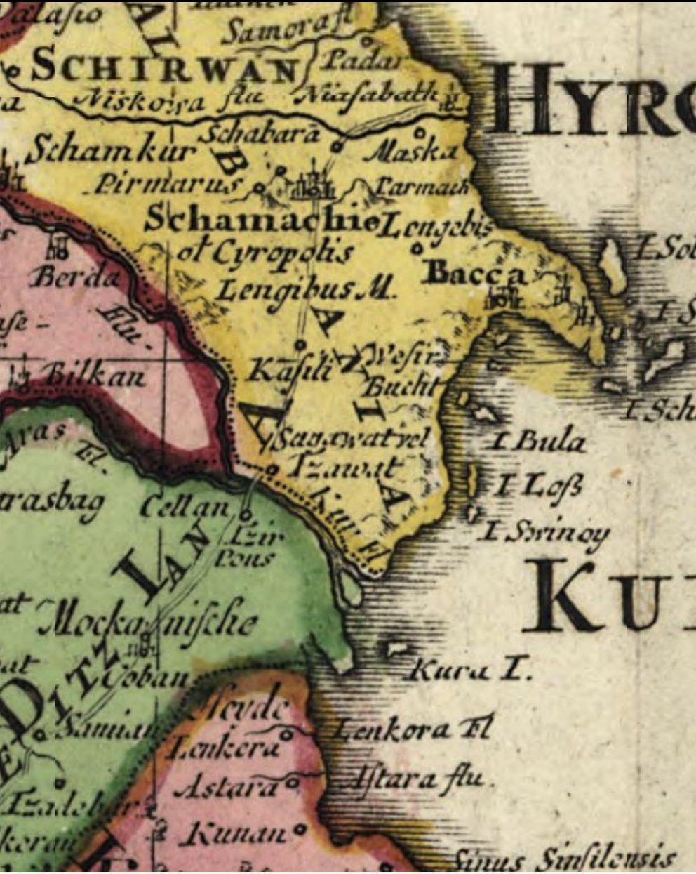 1730-cu ildə Cavad (Tzawat) və Qalaqayın (Cellan) qala şəhərləri.Bu yerlər müasir Sabirabad rayonunun ərazisində yerləşir.